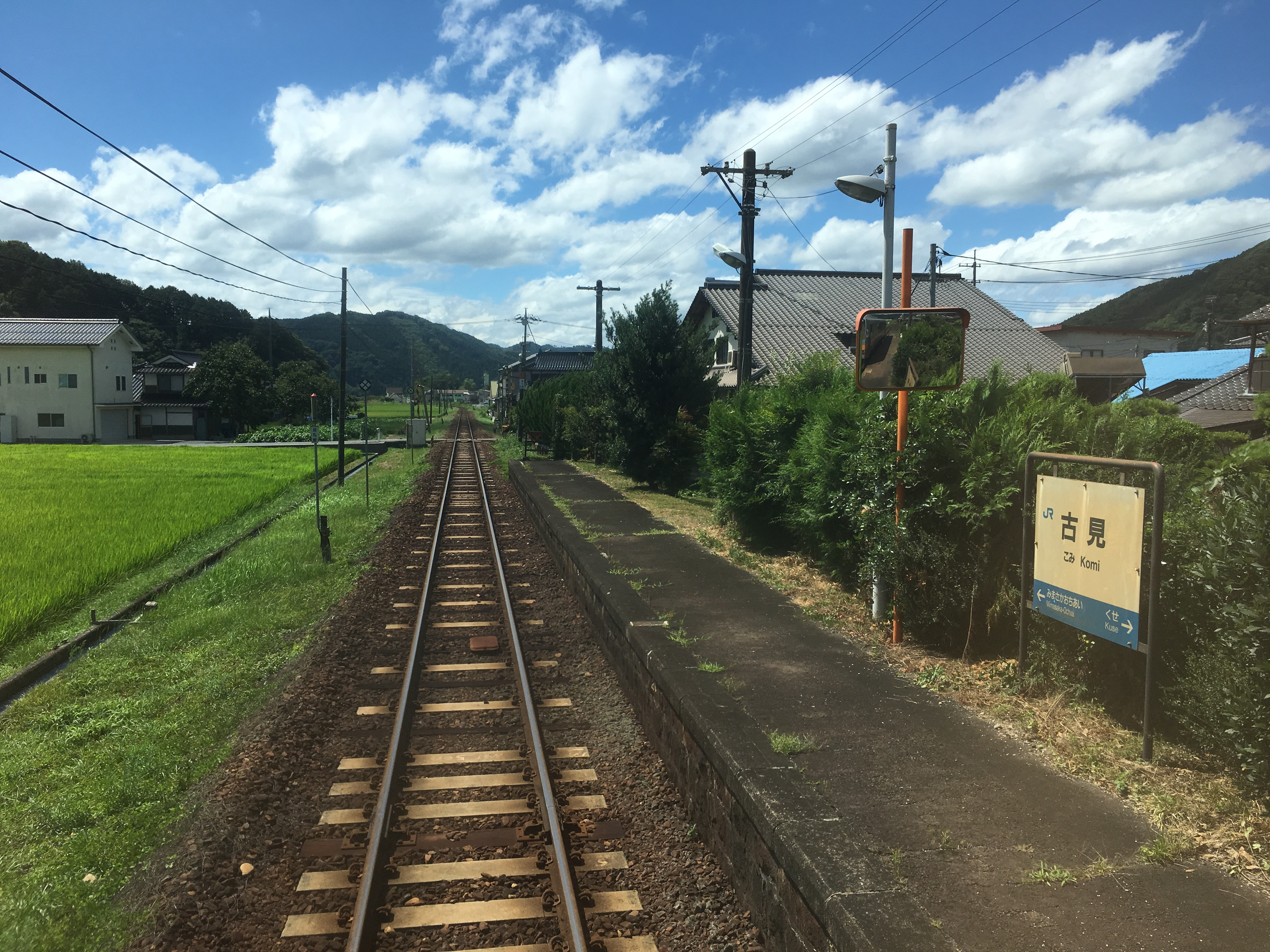 Komi Station (古見駅)